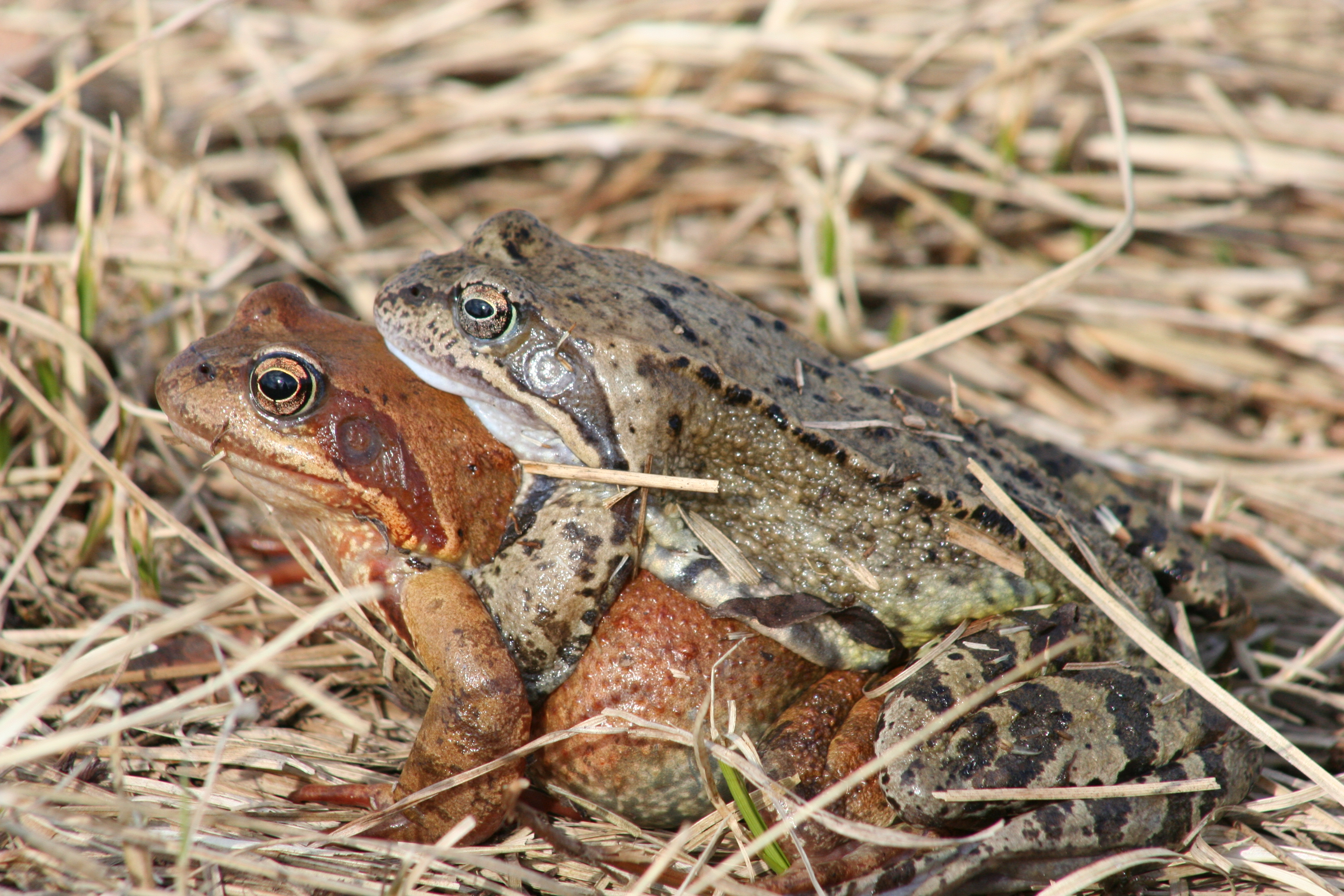 Pareja en amplexo Amplexus, Ampleksus.